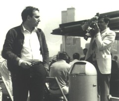 Giuseppe Garimoldi